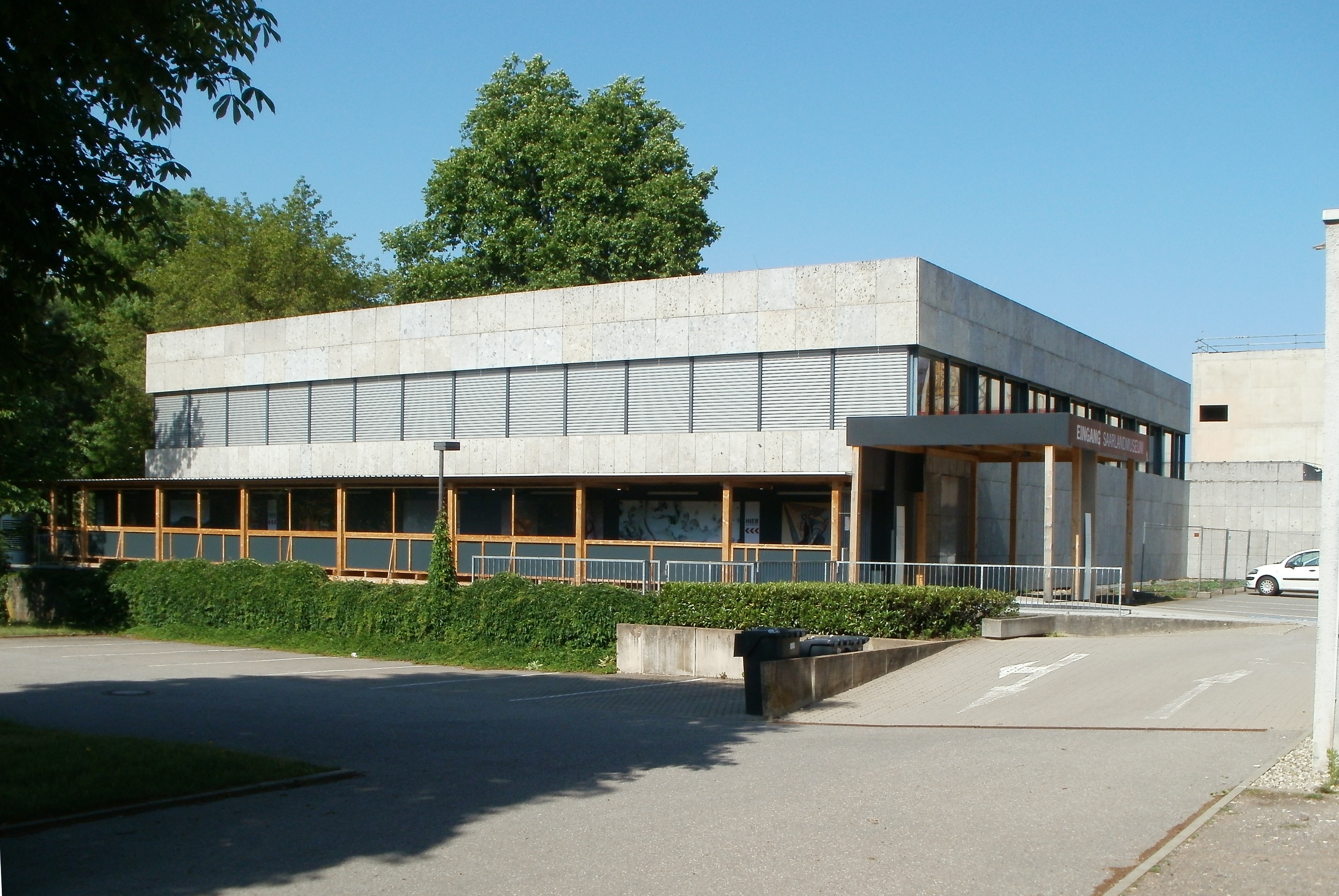 Provisorischer Eingang zur Modernen Galerie Saarbrücken während des Erweiterungsbaues